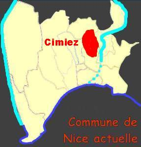 Nice - Quartiers de Nice Schema général de situation